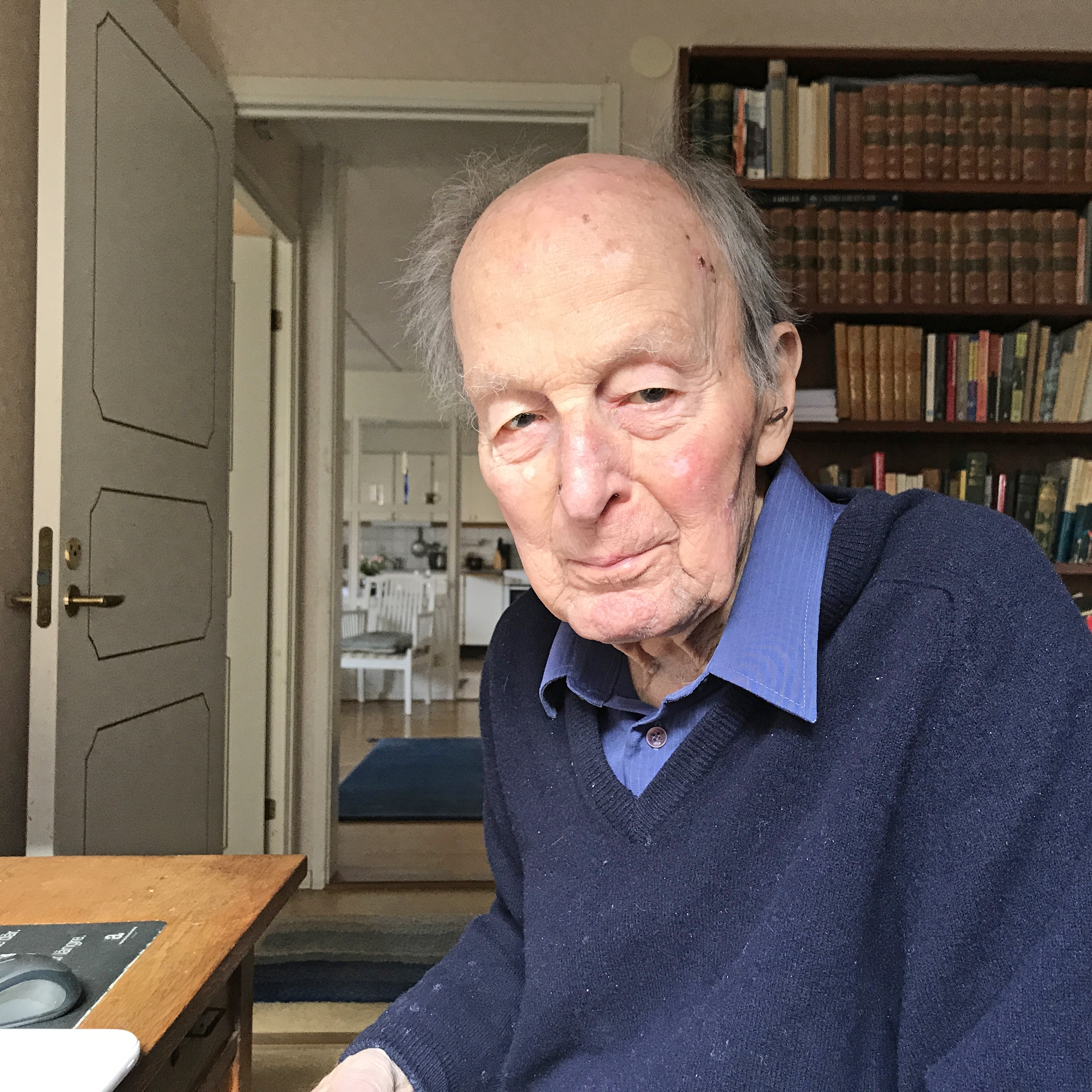 Emin Tengström, svensk latinist och humanekolog